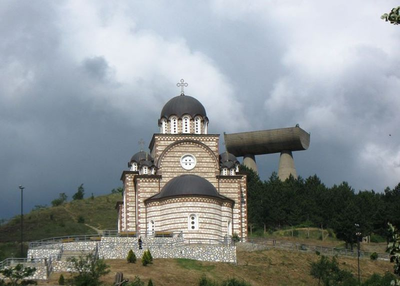 Crkva Svetog Dimitrija. Snimak: Radosav Stojanovic